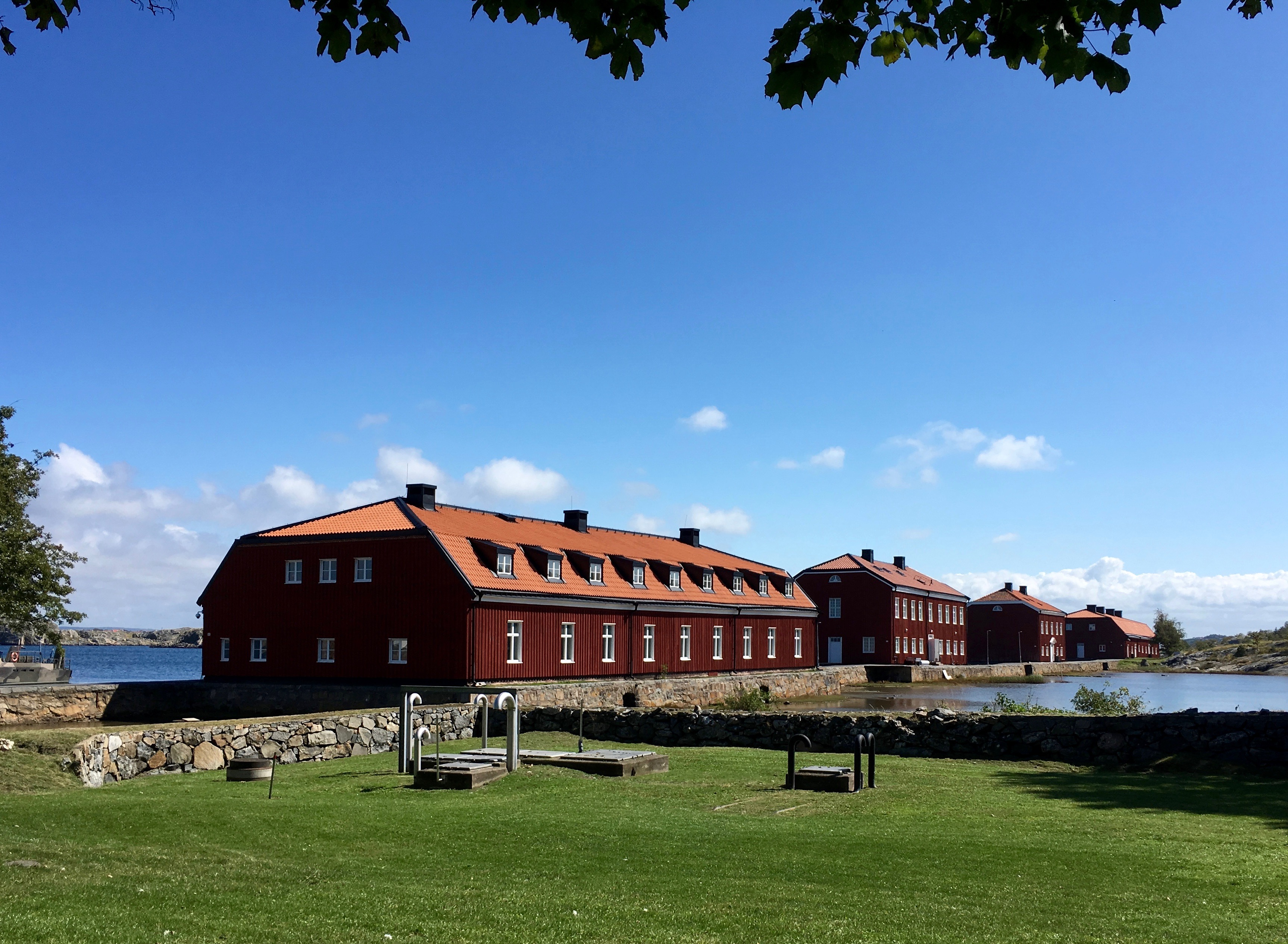 Karantänsstationen på Stora Känsö. Byggnaderna är från vänster: Magasin 1, Pestsjukhuset, Observationssjukhuset och Magasin 2.